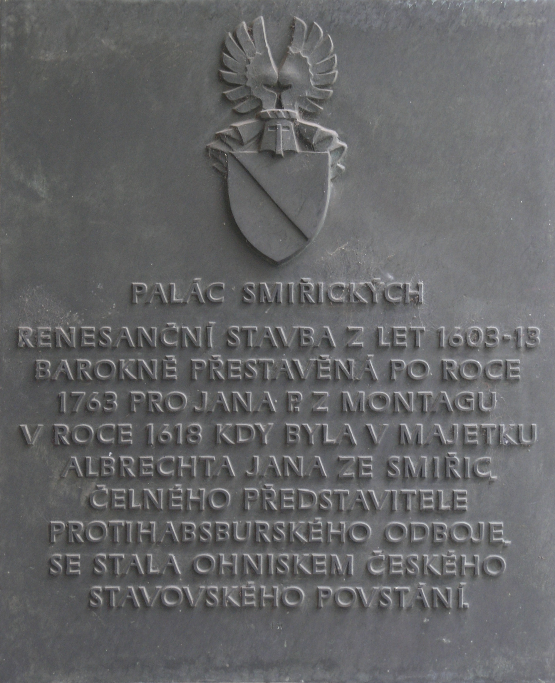 Praha, Malá Strana - Malostranské náměstí, Palác Smiřických (informační deska)